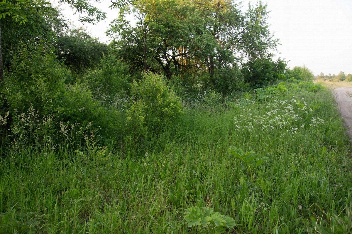 Шляпы. Меркаванае месца вайсковых пахаванняў ПСВ